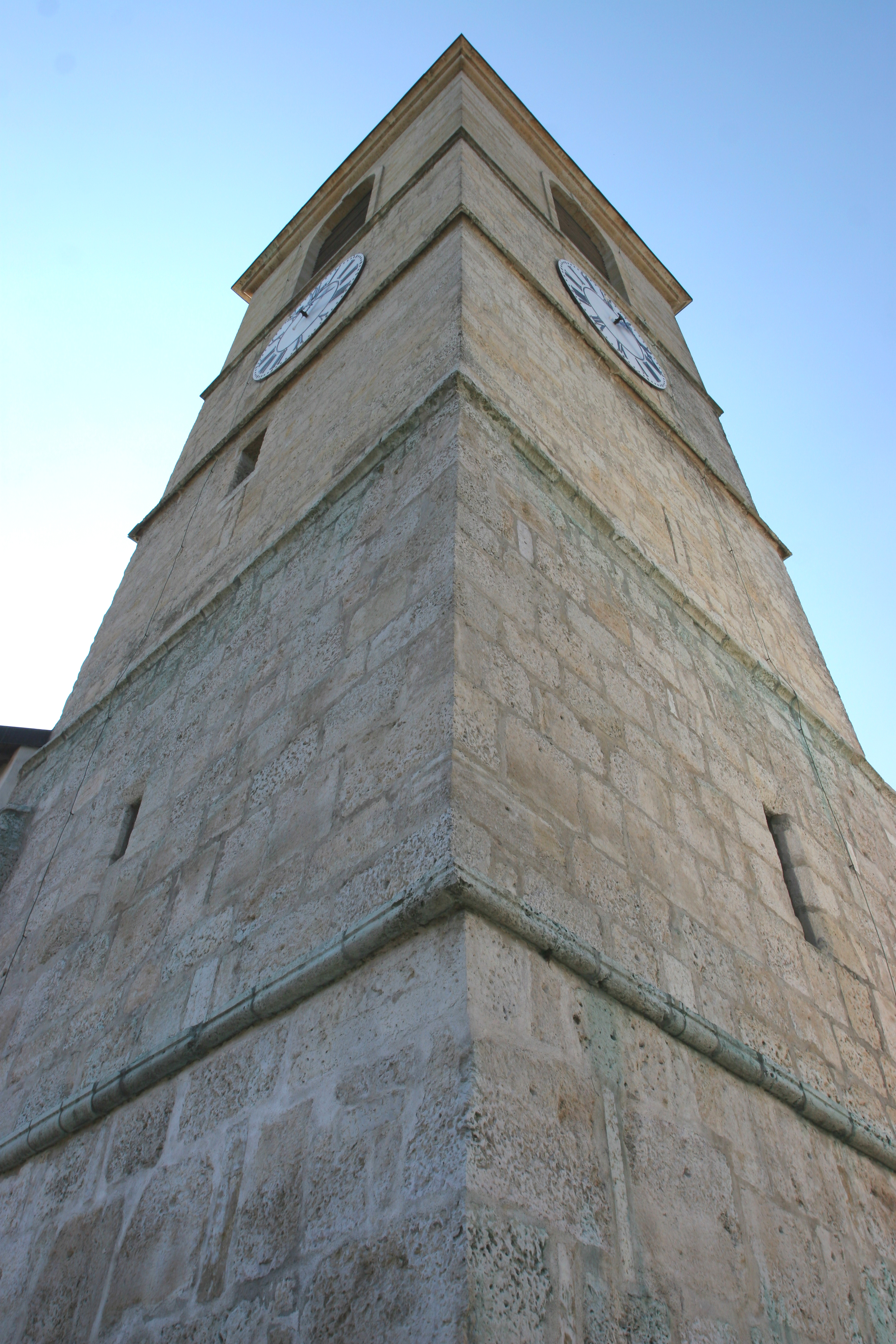 Vue extérieur, façade nord